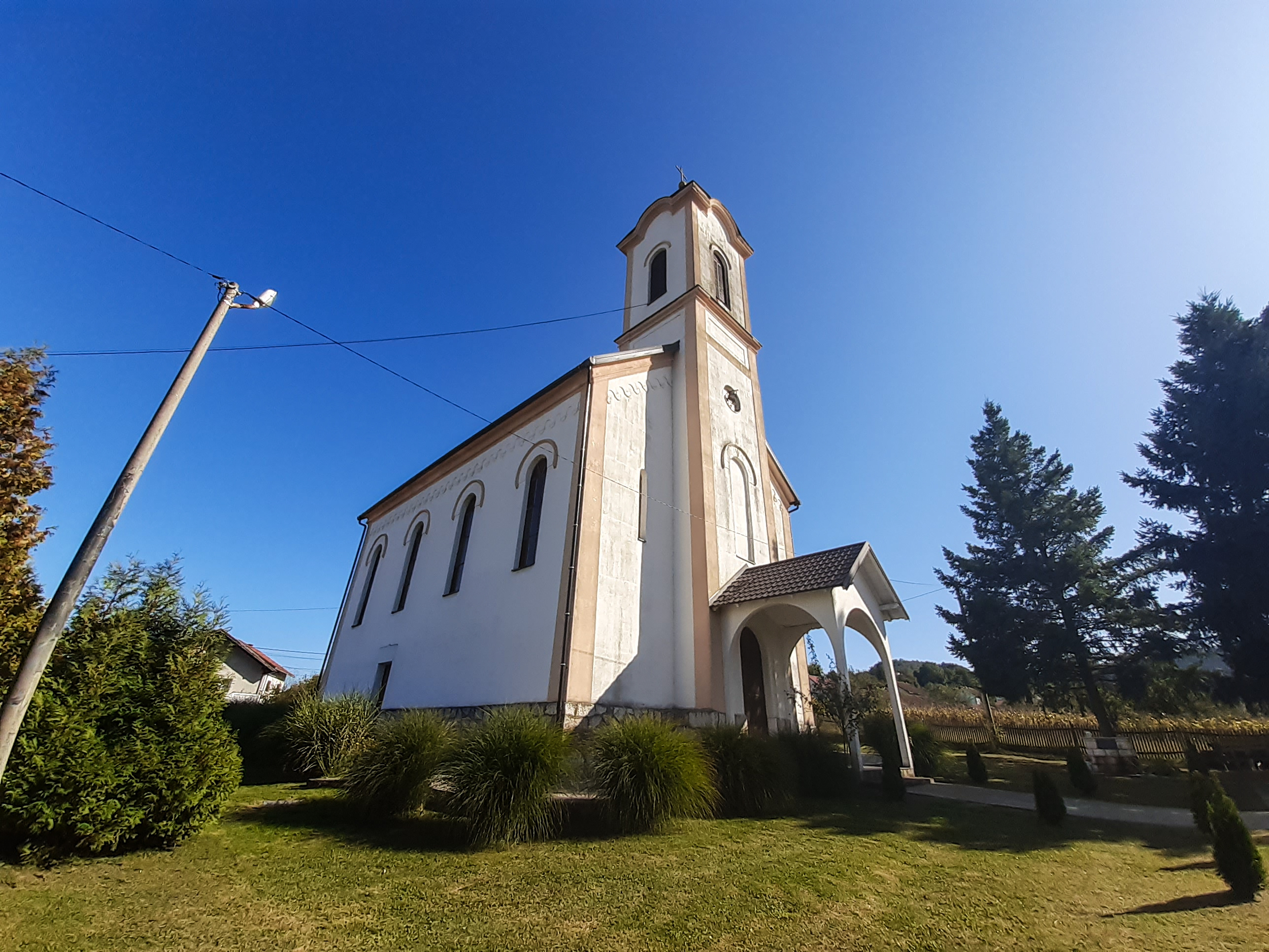 Crkva Silaska Sv. Duha, Boljanić (Doboj). This image was uploaded as part of Trace of Soul 2019.